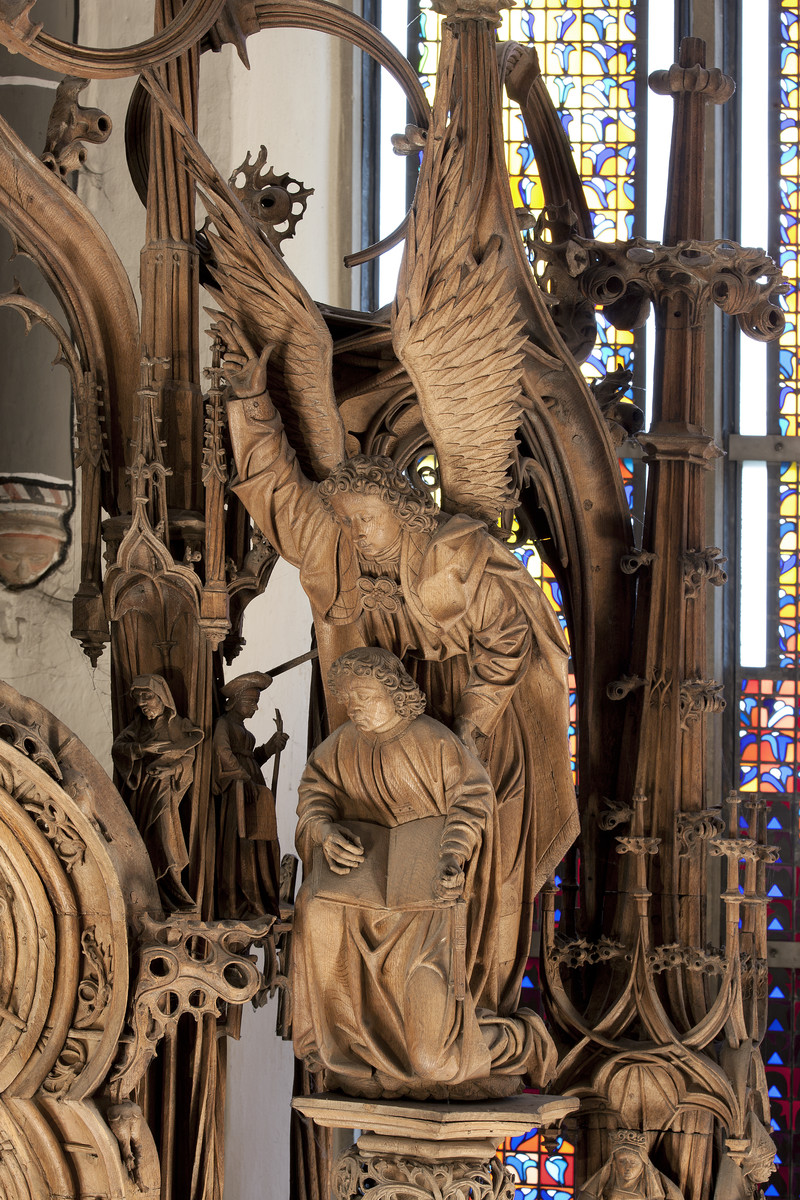 Sieben-Schmerzen-Altar, Johannes auf Patmos und Engel